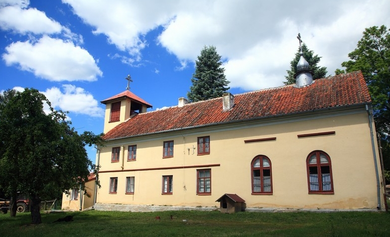 Wojnowo – wieś w województwie warmińsko-mazurskim, w powiecie piskim, w gminie Ruciane-Nida